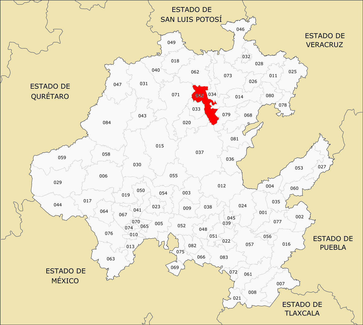 Municipio de Hidalgo